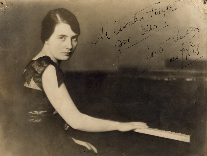 Fotografía autografiada de Rosita Renard, pianista chilena (1894-1949).